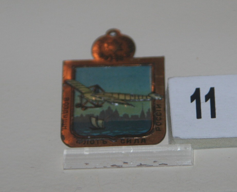 Знак военной авиации Фарруха Гаибова